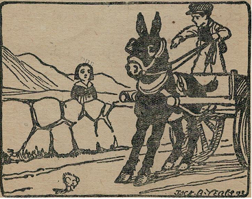 Leabhar scoile chun an Ghaeilge a fhoghlaim